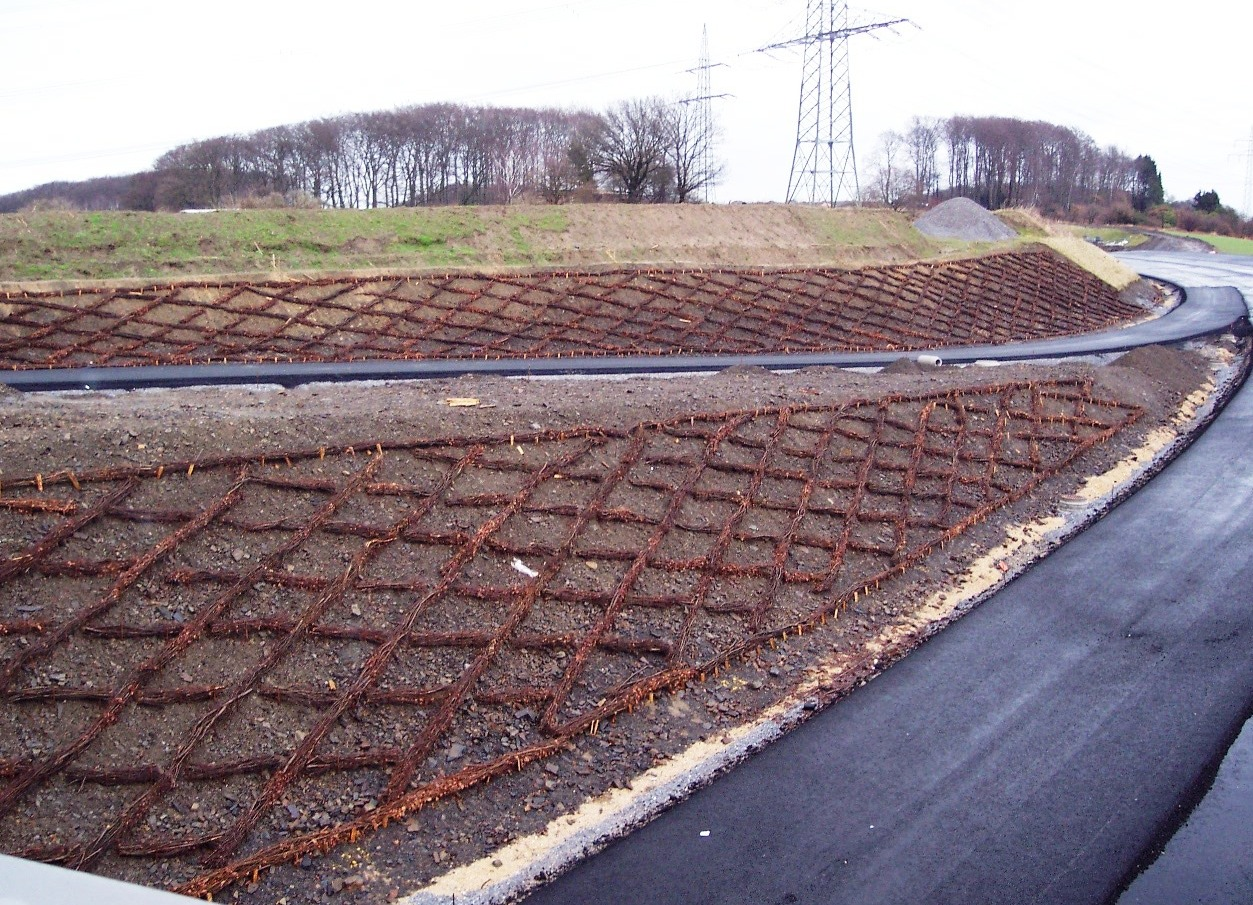 Faschinen im Rautenverband. Faschinenverbau bei Baustelle Velbert.